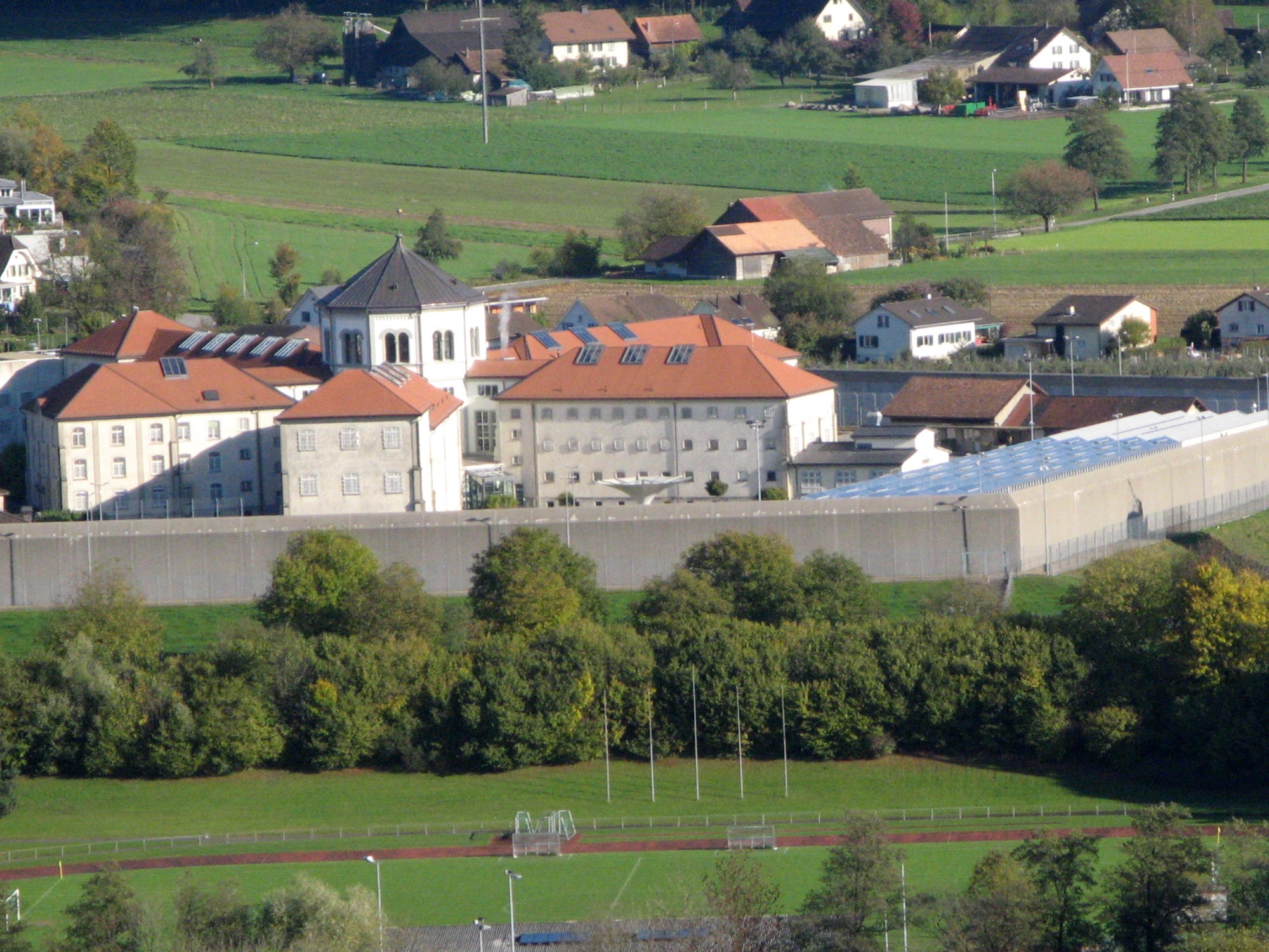 Strafanstalt Lenzburg, auf dem Staufberg aufgenommen